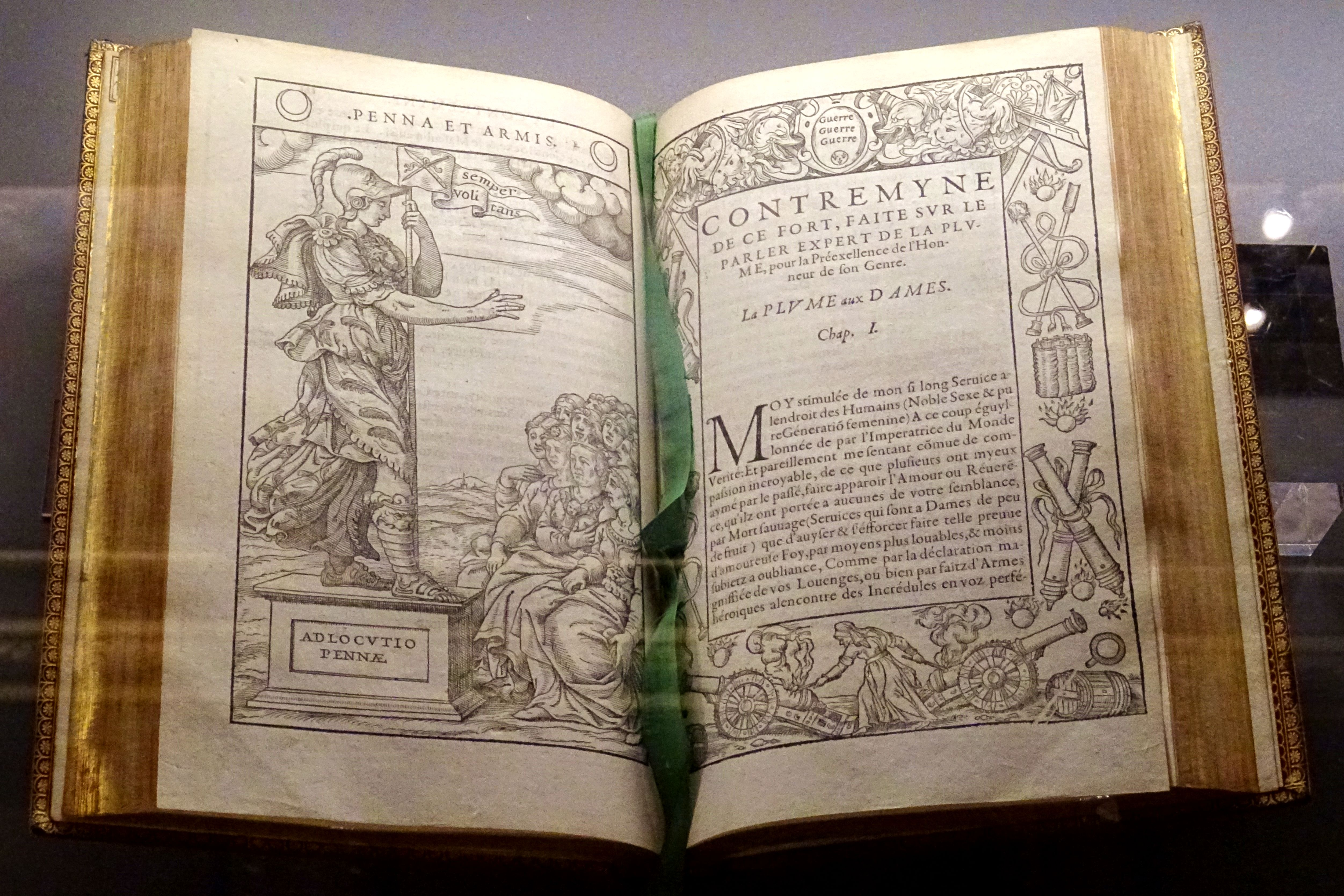 François de Billon, Le Fort inexpugnable de l'honneur du sexe féminin, Paris, Jean Dallier, 1555. Musée Condé, château de Chantilly.